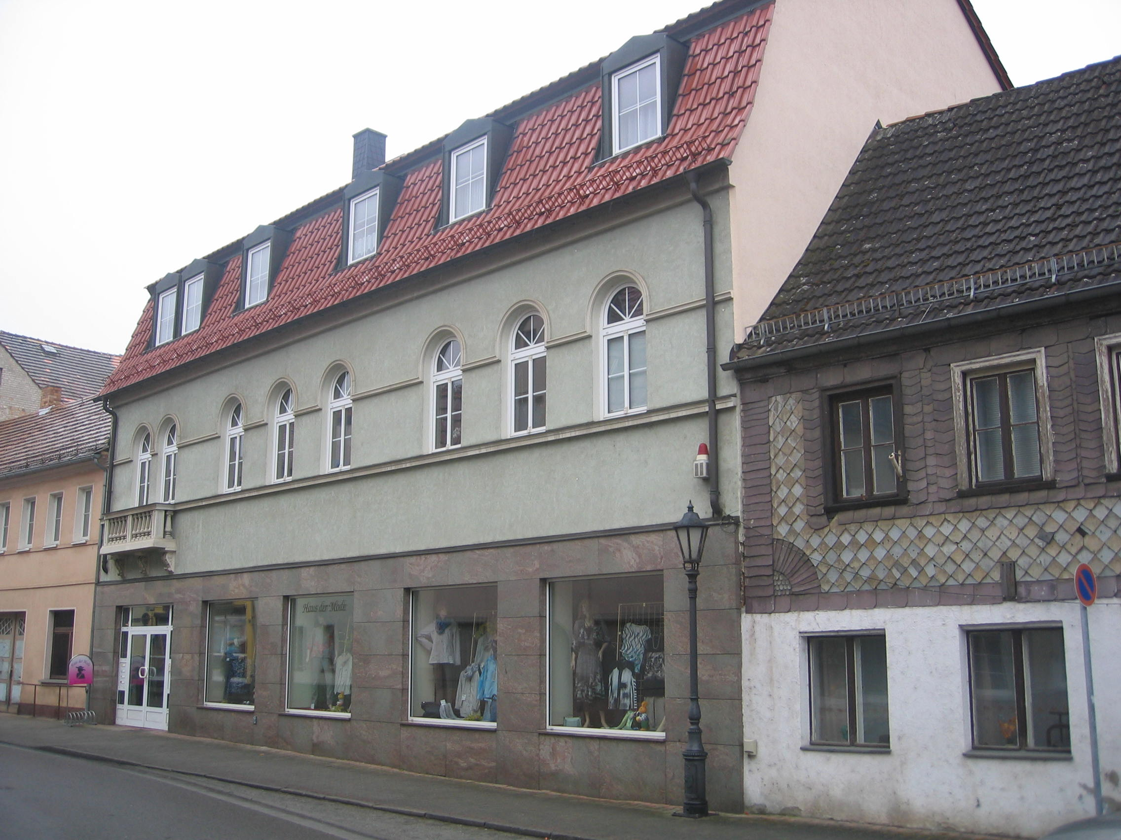 Ruhland, Berliner Straße 18, Ostansicht